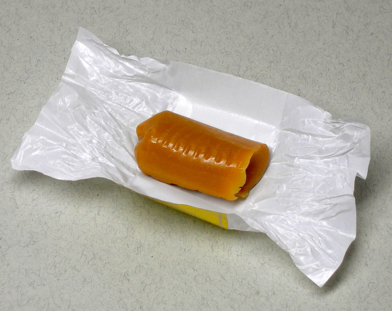 Caramel candy, Karamelle, Sahnebonbon